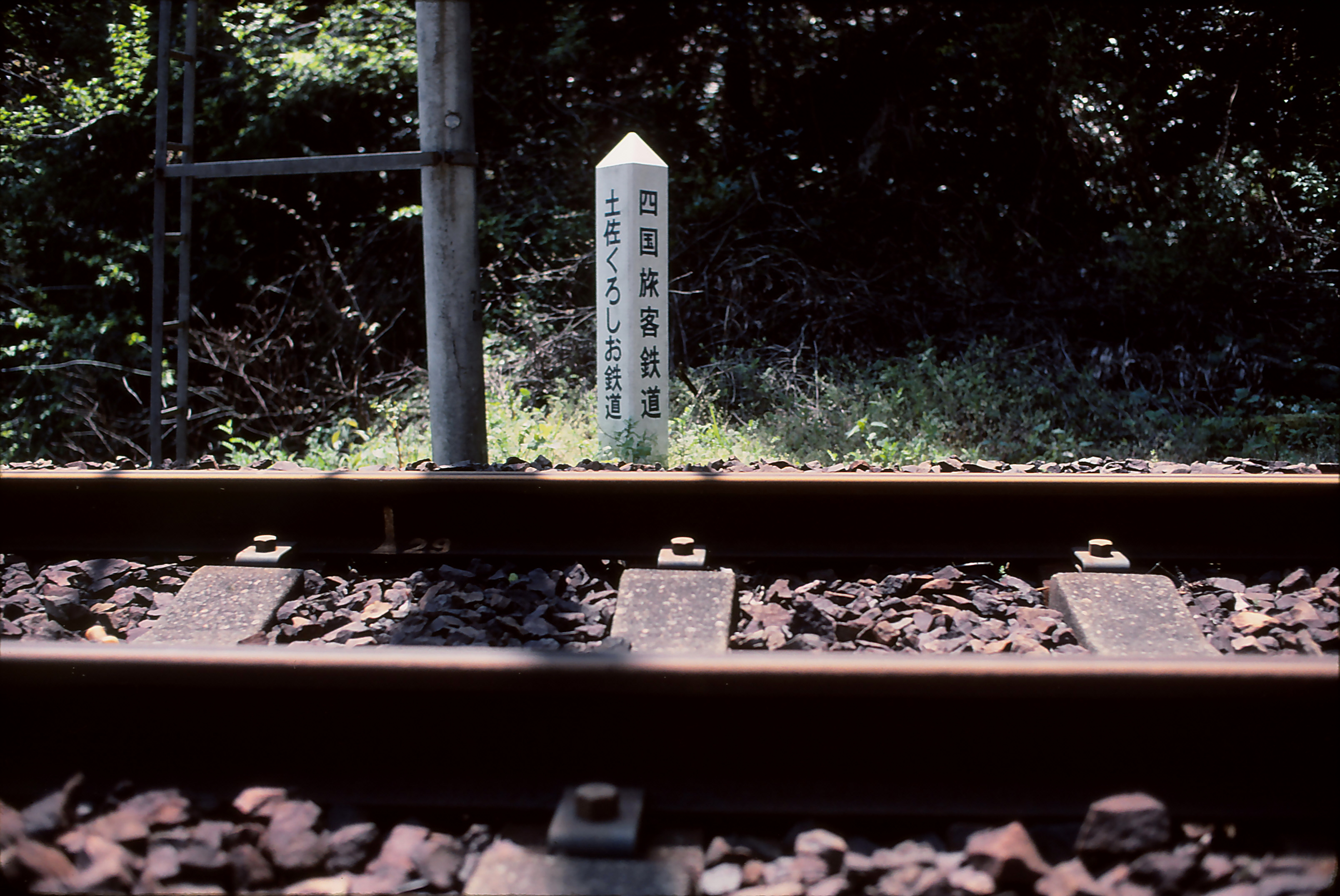 川奥信号場 信号機横にある会社境界表示。 高知県幡多郡黒潮町川奥